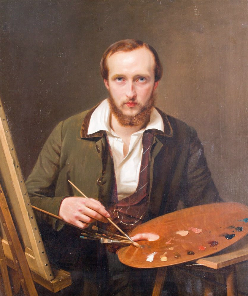 Selbstportrait mit Palette